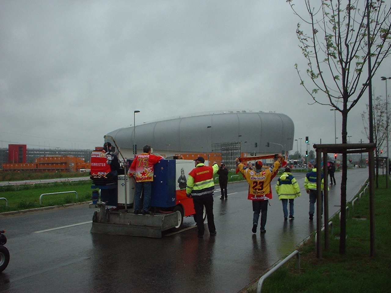 ISS-Dome in Düsseldorf-Rath - Fanmarsch: Ankunft der Eismaschine